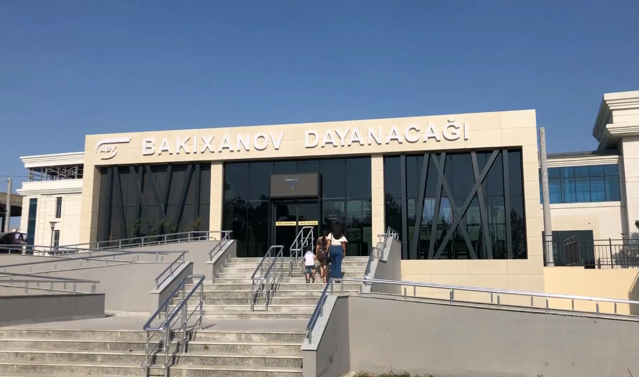 Станция Бакиханов